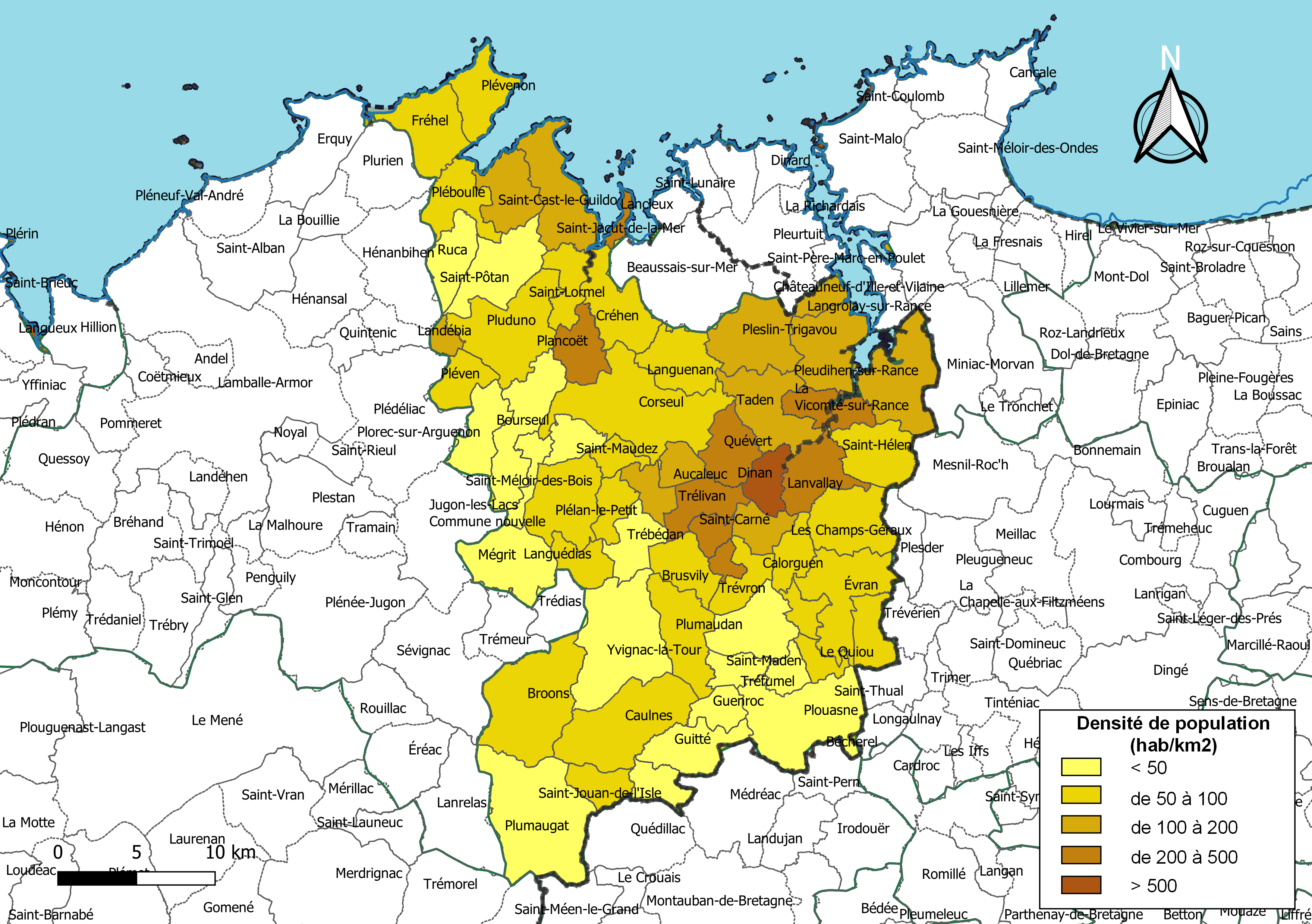 Carte des densités de population (millésimée 2016) des communes de l'intercommunalité Dinan Agglomération, département des Côtes-d'Armor, France. Composition au 1er janvier 2019.